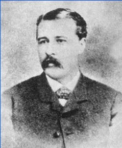 Alejandro Korn.